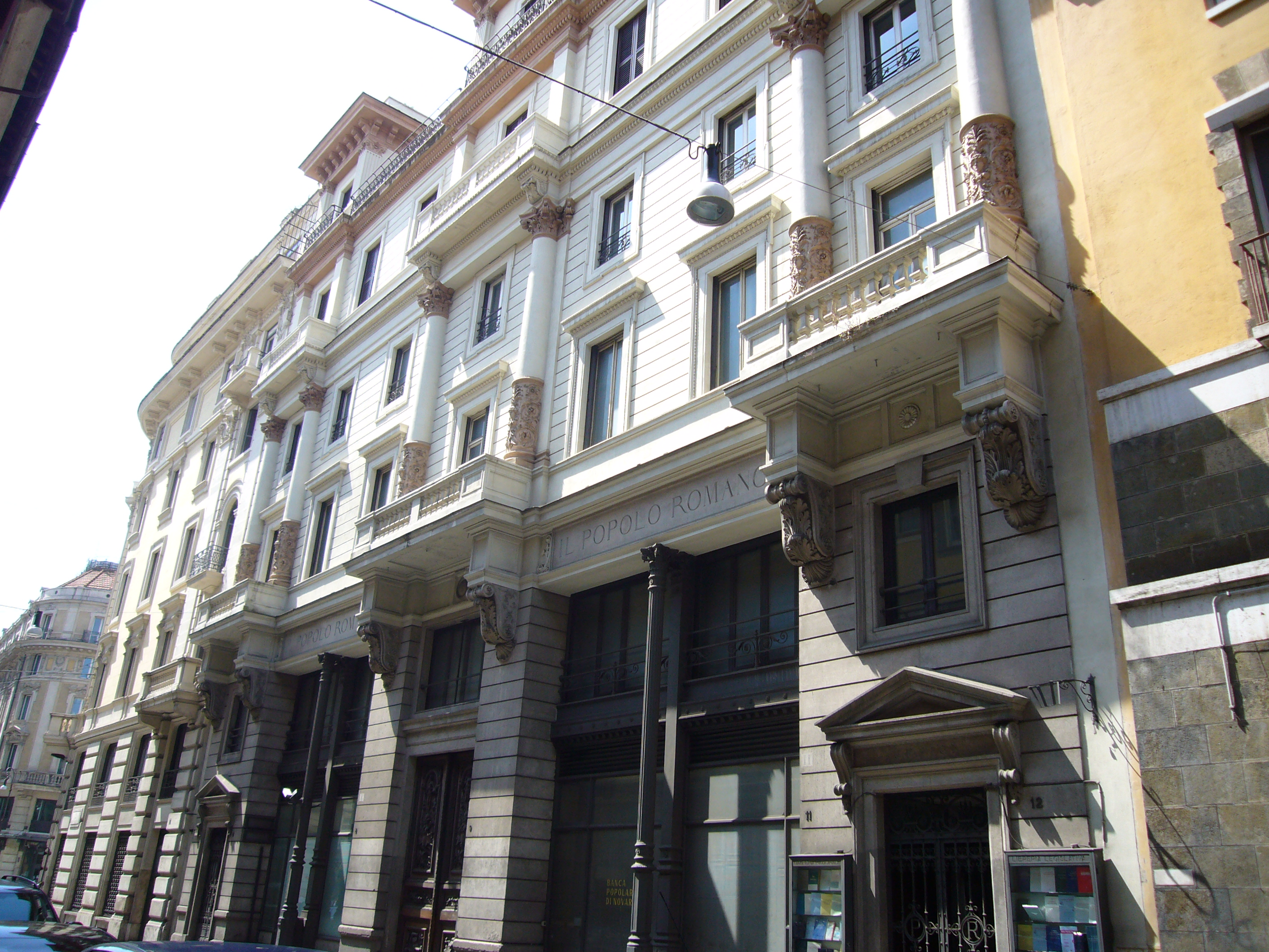 Roma, via Due Macelli. Palazzo Chauvet, già sede (1875-1924) del quotidiano Il Popolo Romano.